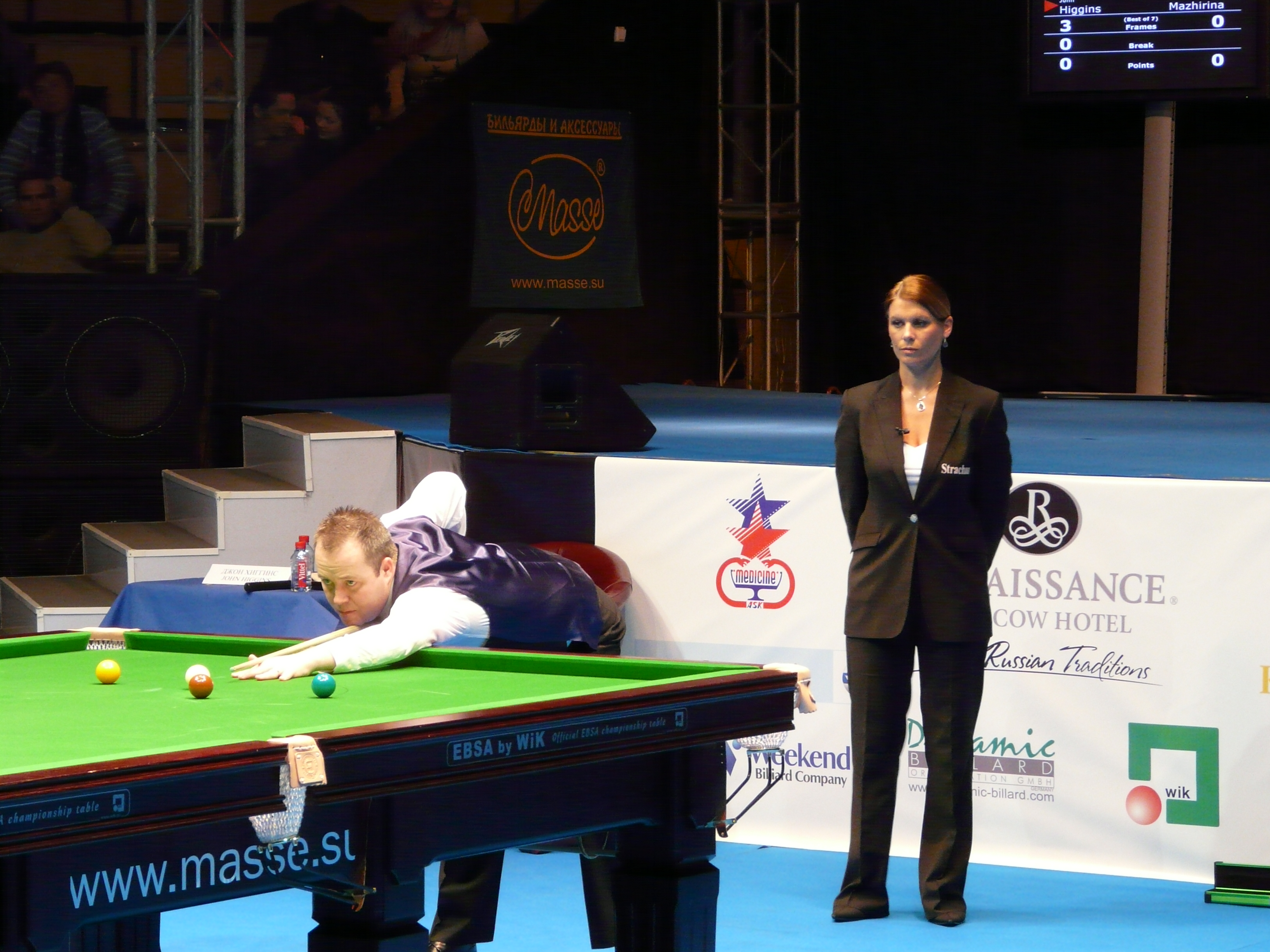 Туринир World Series of Snooker в Москве